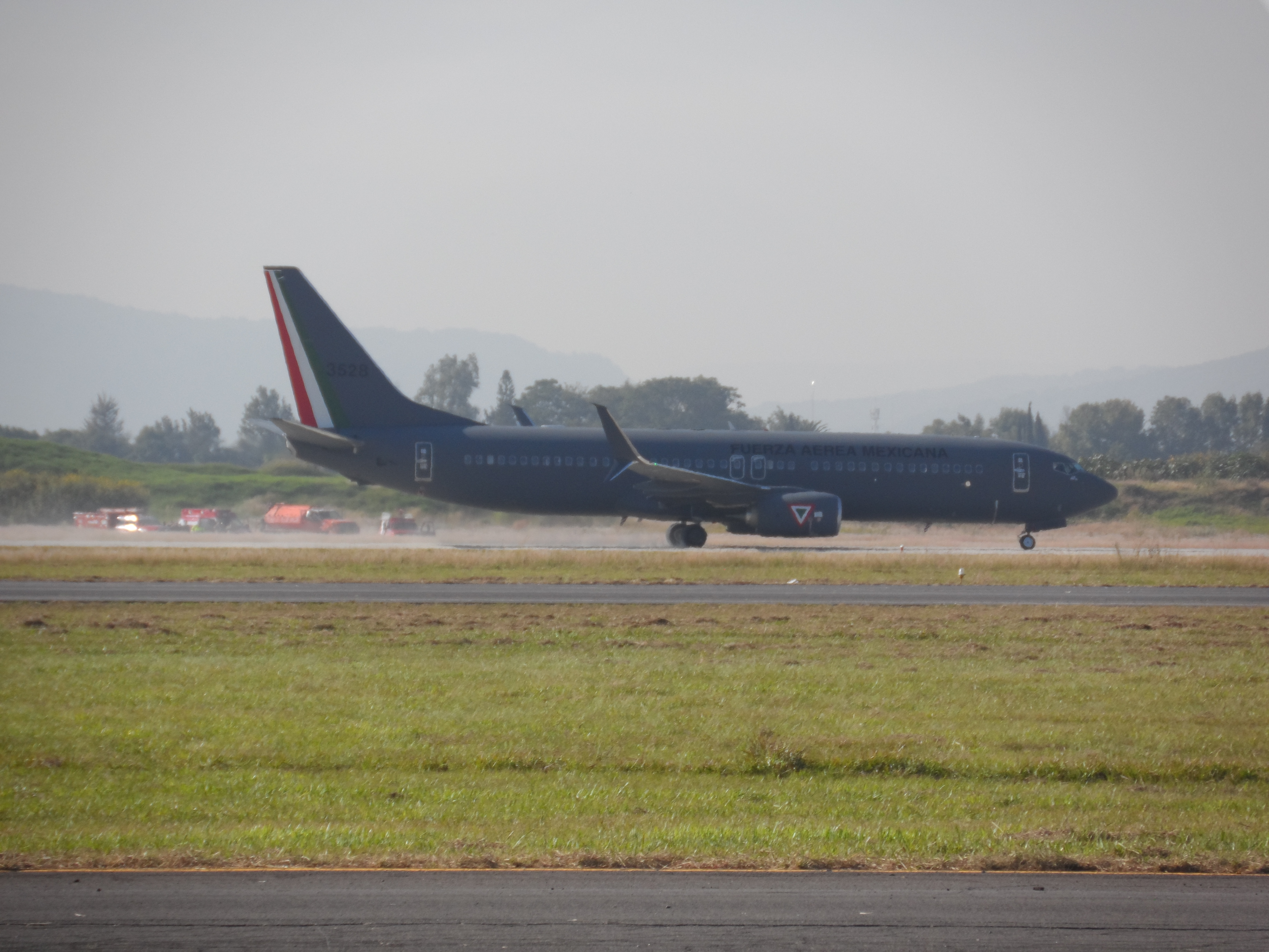 Avión Boeing 737-800 de la Fuerza Aérea Mexicana, perteneciente al Escuadrón Aéreo 502, en la pista principal de la BAM No. 5, en Zapopan, Jalisco.